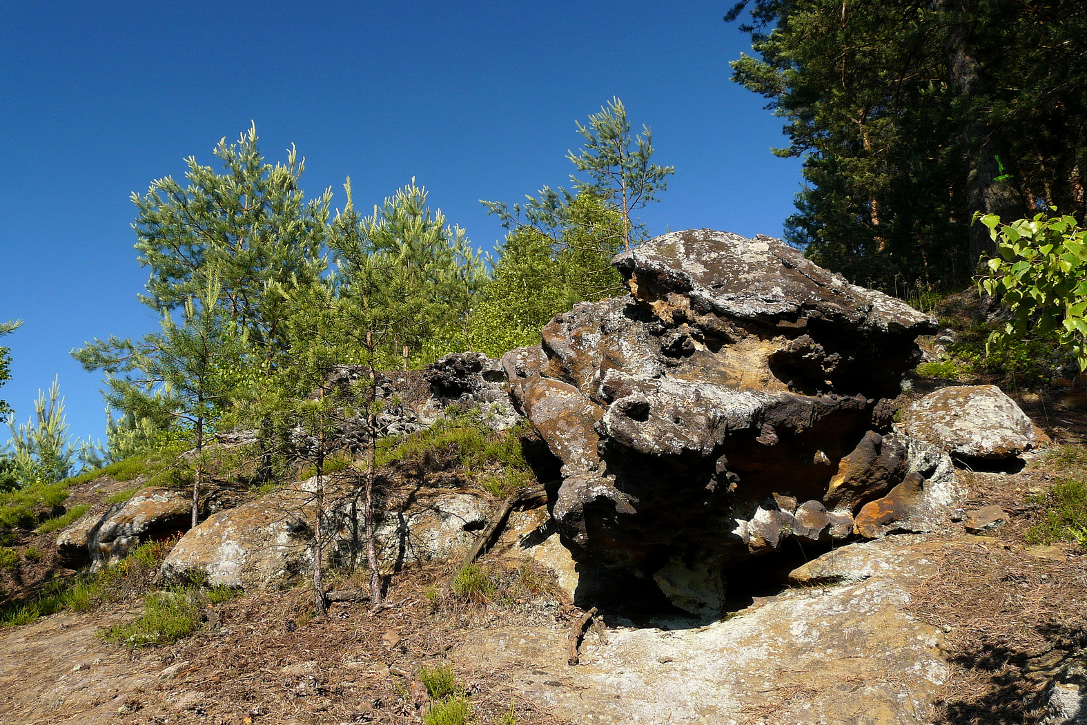 Pískovcové skalky na Víšku